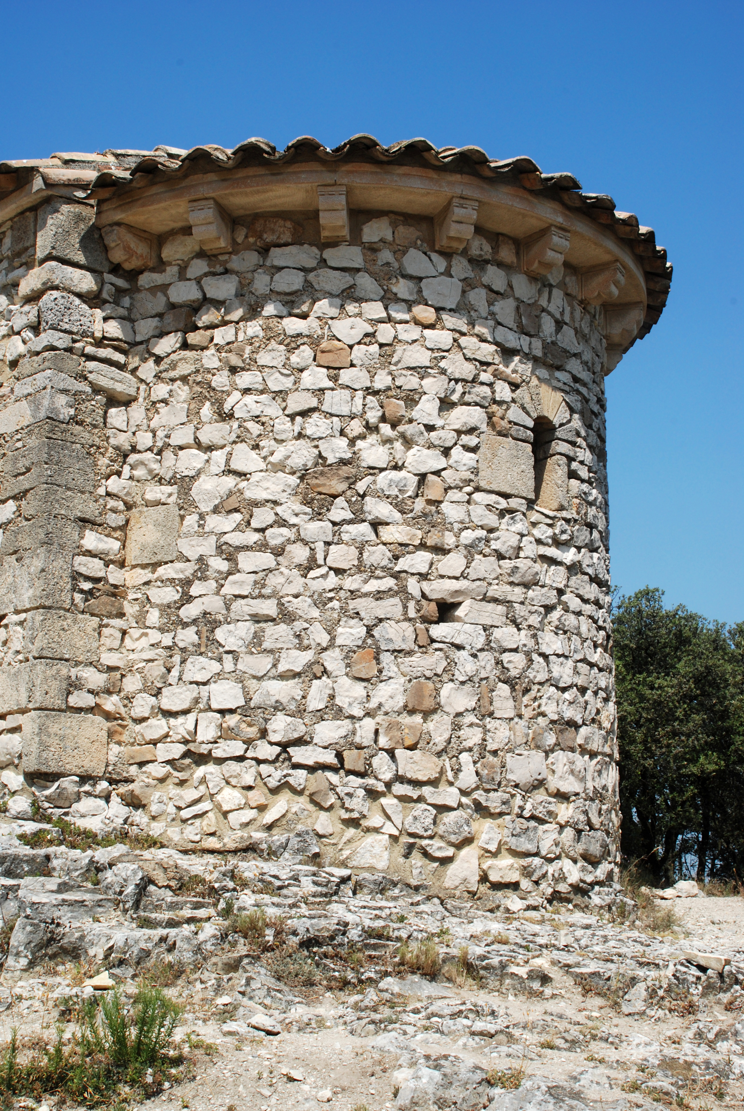 France - Provence - Vaucluse - Le Thor - Chapelle Saint-Pierre de Thouzon